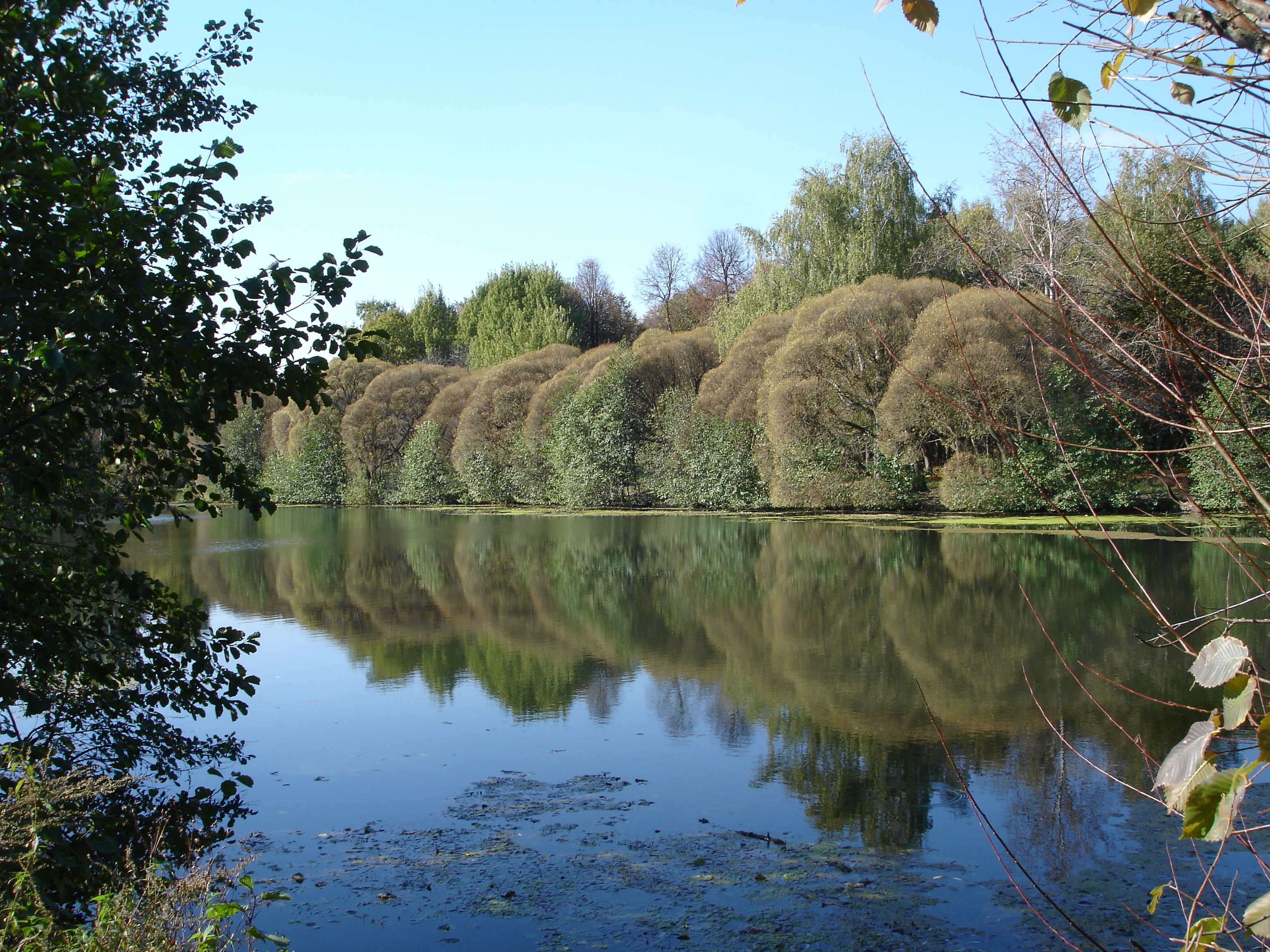 Один из трёх декоративных прудов в Измайловском Парке, город Москва.